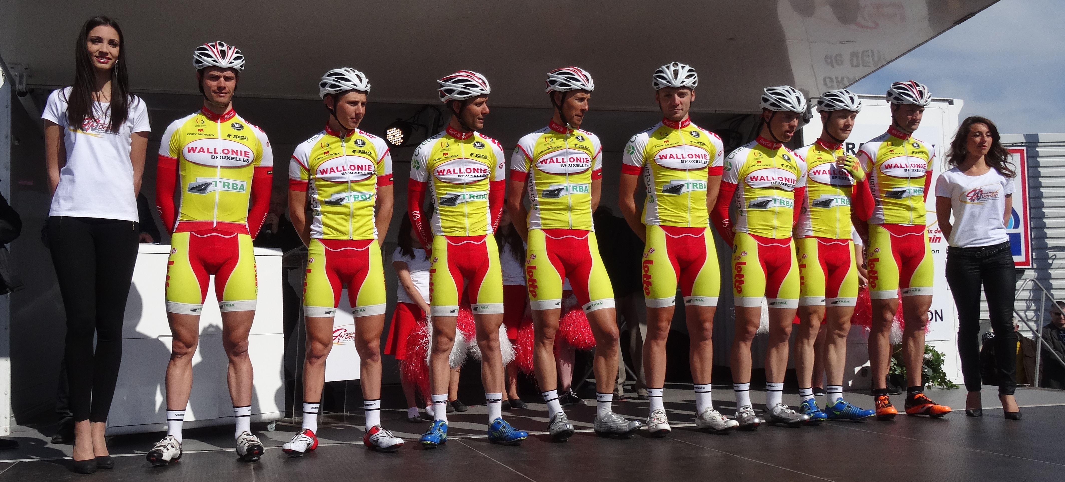 Reportage réalisé le jeudi 17 avril à l'occasion du départ et de l'arrivée du Grand Prix de Denain 2014 à Denain, Nord, Nord-Pas-de-Calais, France.